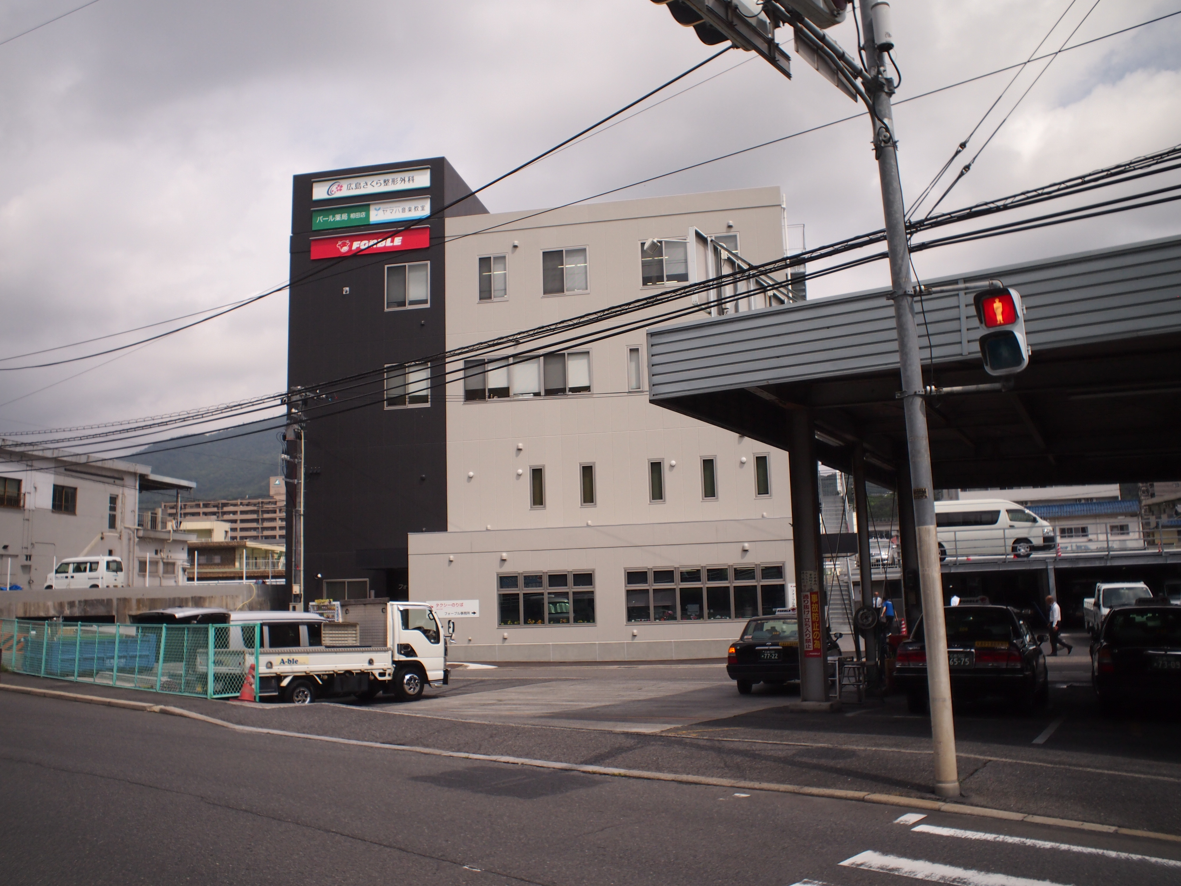 フォーブル本社